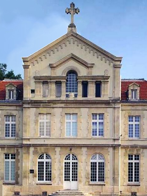 Château de Ladoucette